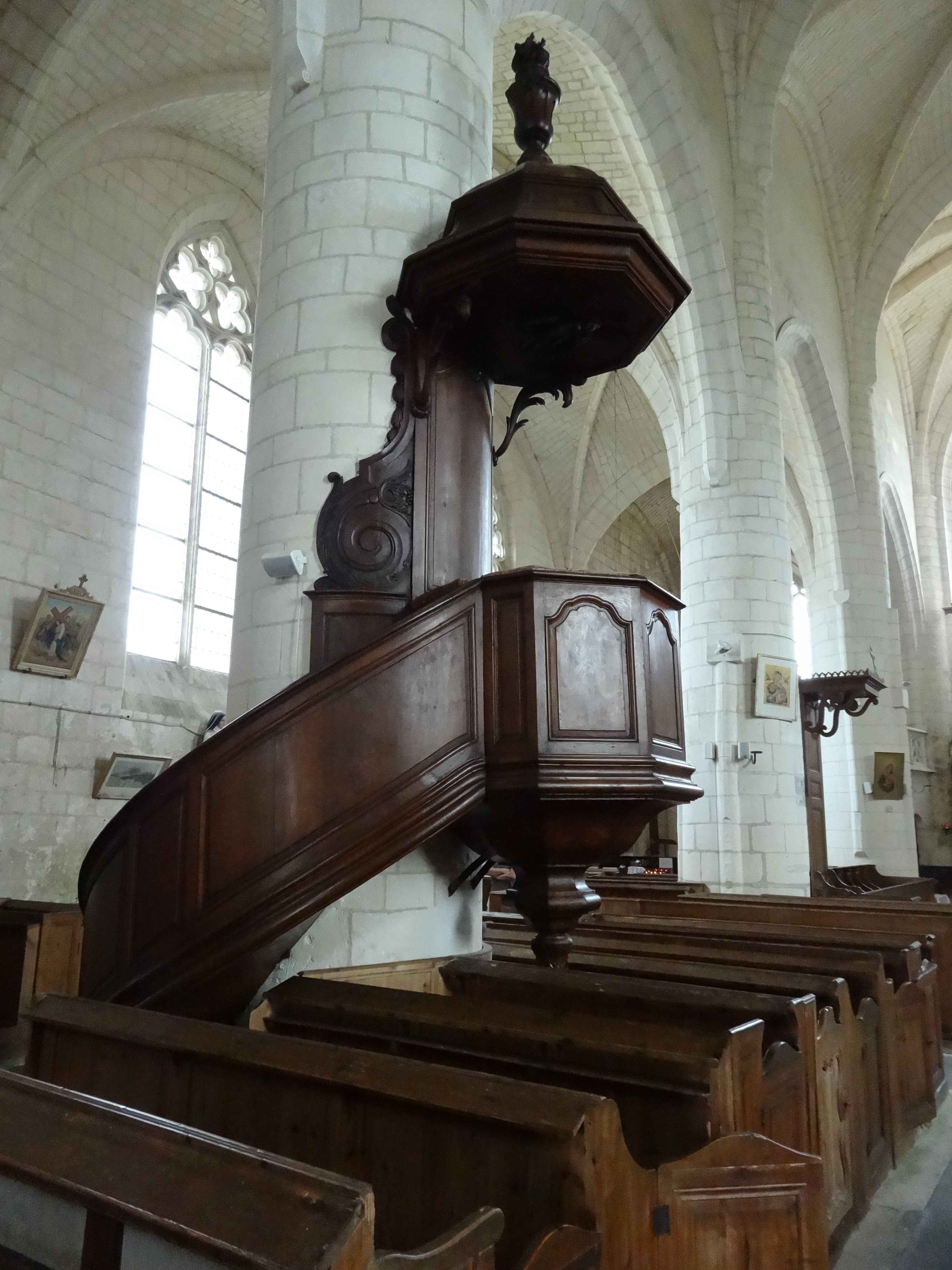 chaire à prêcher de l'église d'Esnandes (Charente -Maritime) datée de 1775